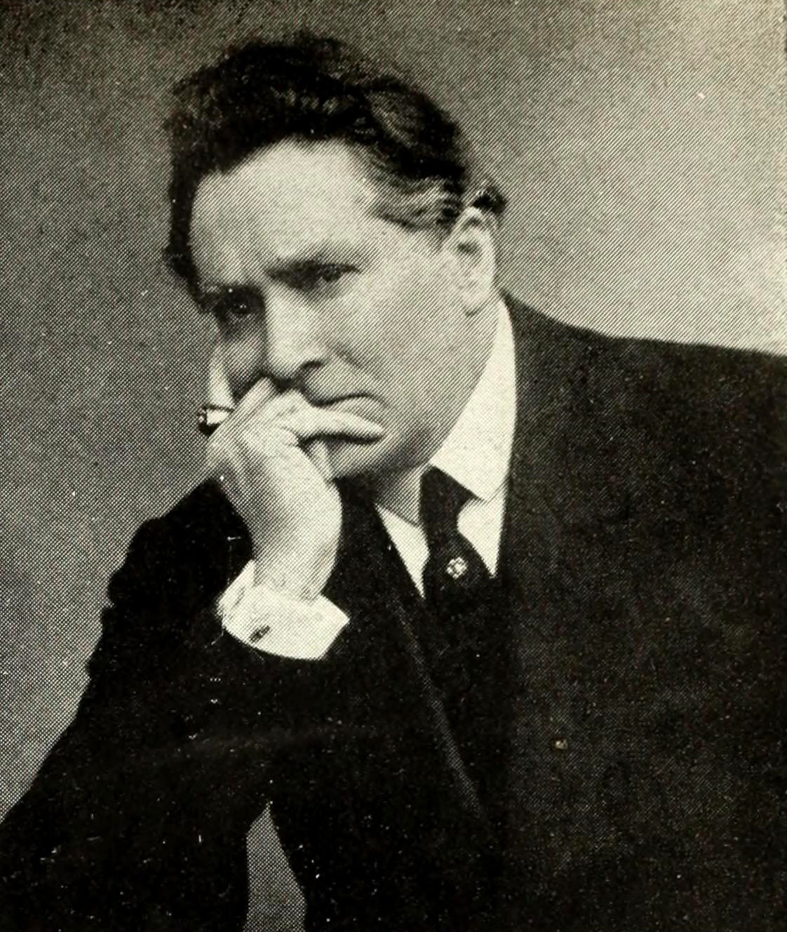 Photographie d'Henry Krauss